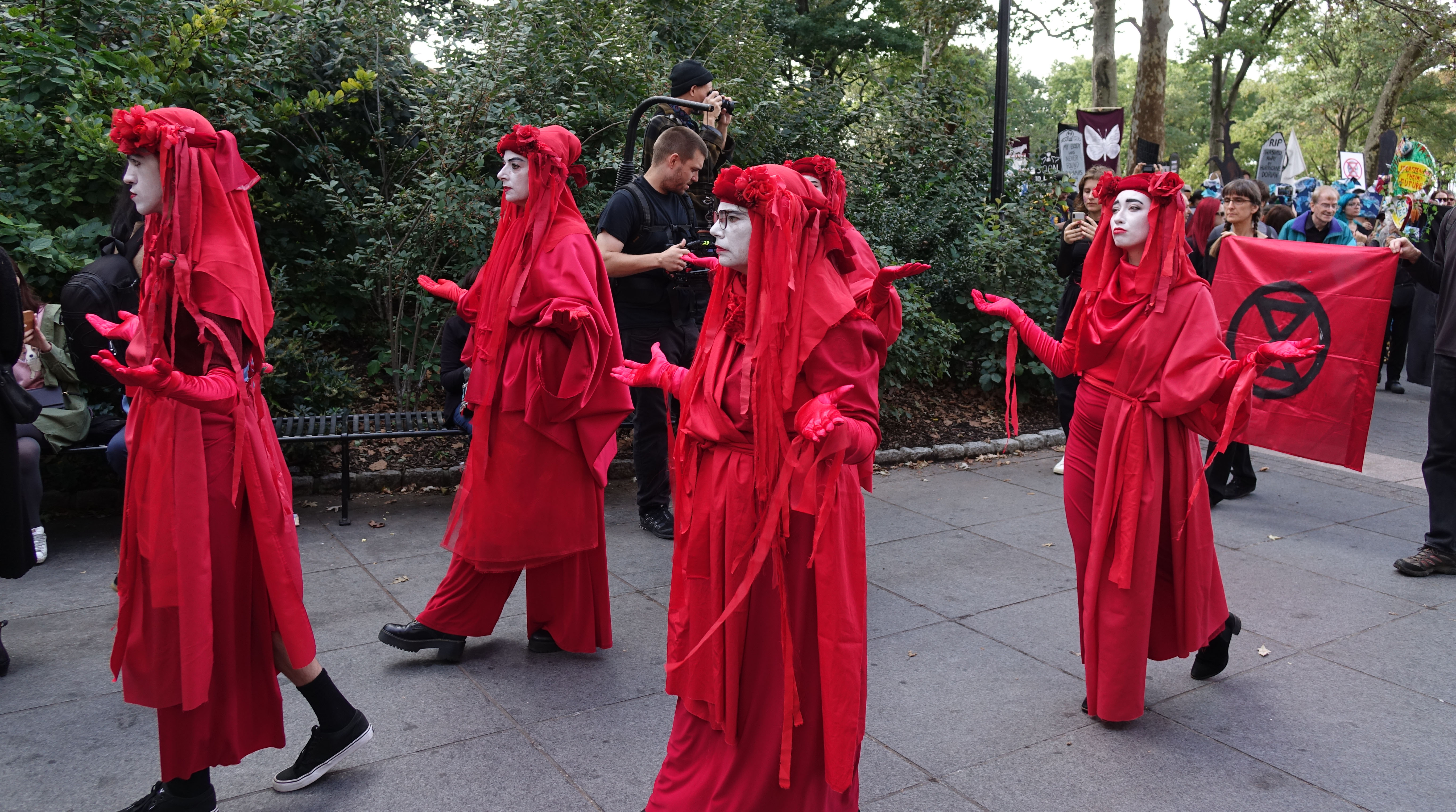 013 XR at Stock Exchange